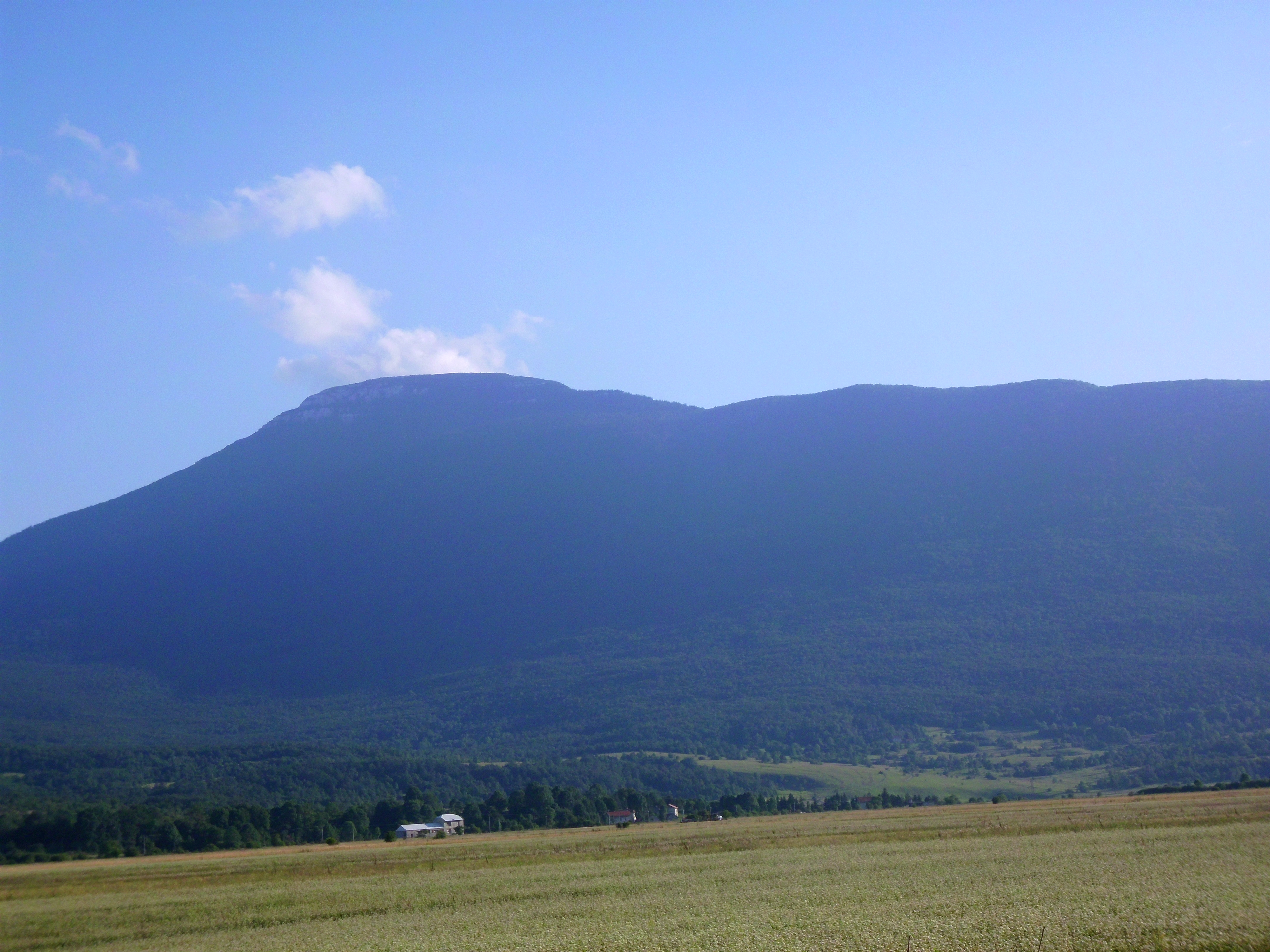 Планина Осјеченица